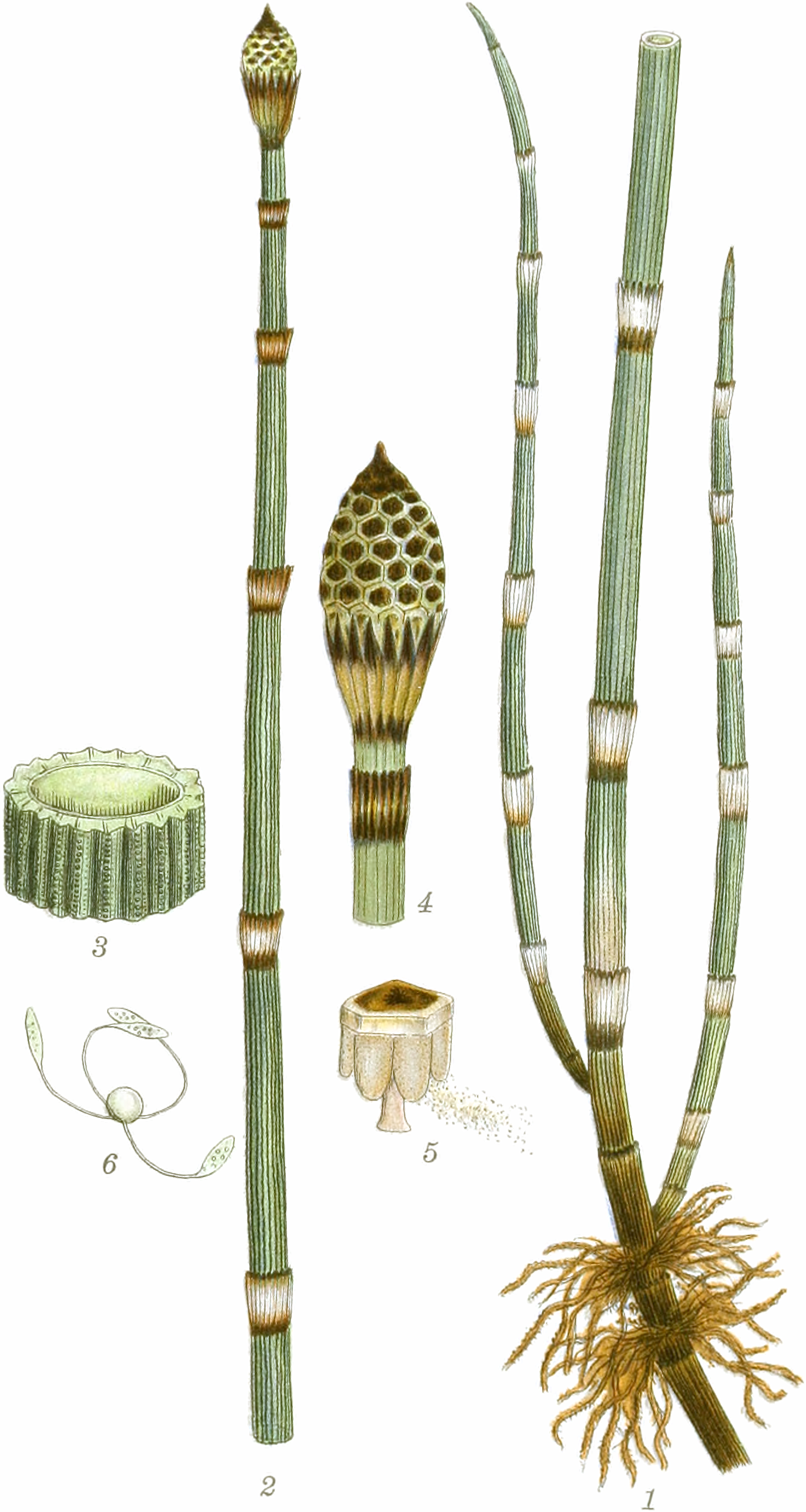 Mentz, A.; Ostenfeld, C. H.: Bilder der Nordflora. Band 2, 1917ff.Equisetum hyemale L.Taf. 513. Abb. 1. Unterer Teil des Stängels mit zwei Ästen und einem Stück Wurzelstock. Fig. 2. Obere Hälfte eines Sprosses mit Blattscheiden und Sporenständer. Fig. 3. Stück eines Stängels im Querschnitt (6/1). Fig. 4. Sporenständer (2/1). Fig. 5. Ein Blatt mit Sporenträger (leicht vergrößert). Fig. 6. Spore (stark vergrößert).